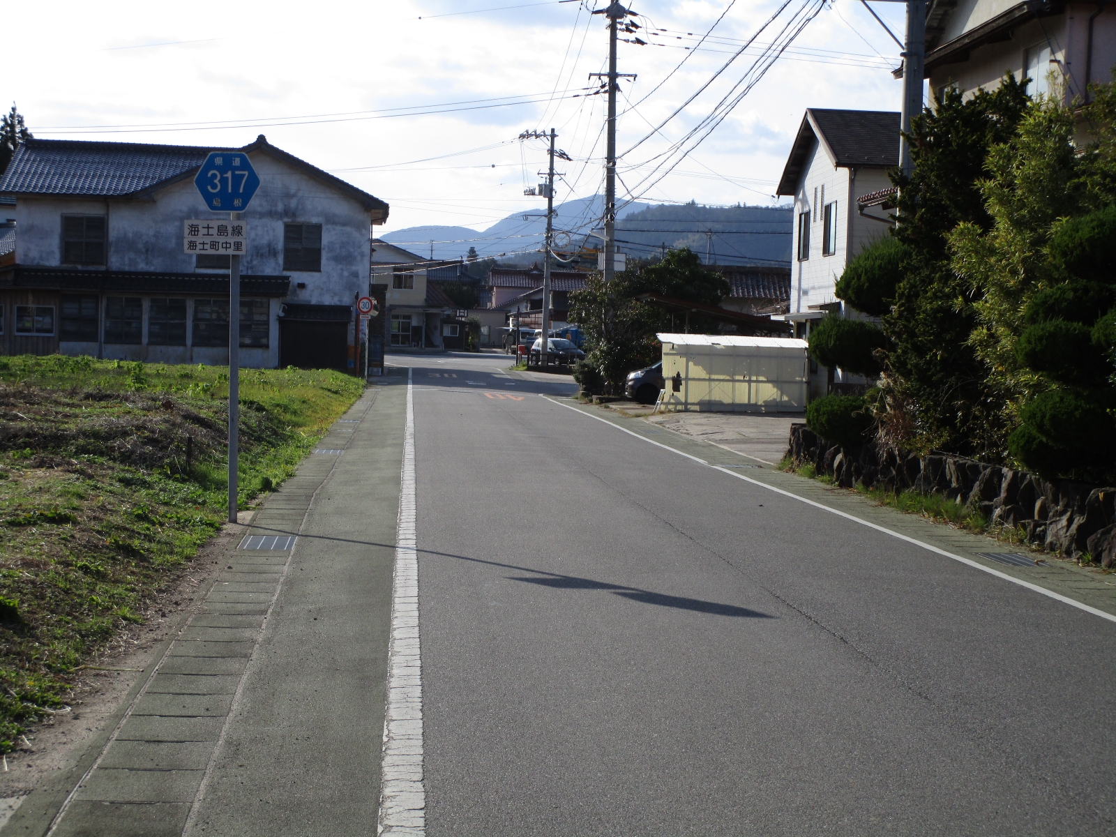 島根県道317号海士島線。島根県隠岐郡海士町中里の海士駐在所付近。